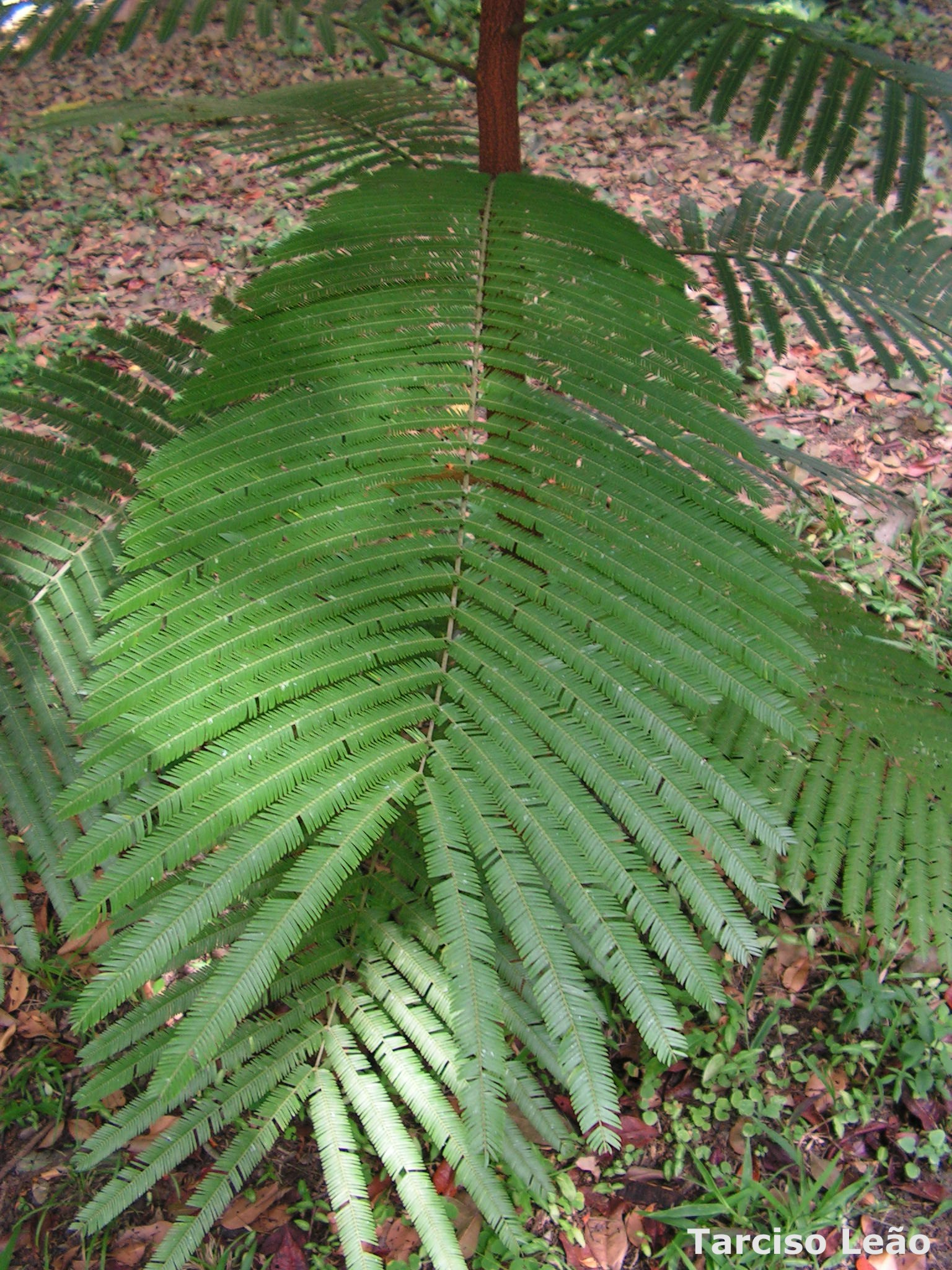 Parkia pendula, visgueiro